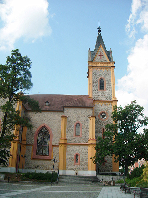 Kostel sv. Jana Nepomuckého (Hluboká nad Vltavou), Masarykova, Hluboká nad Vltavou